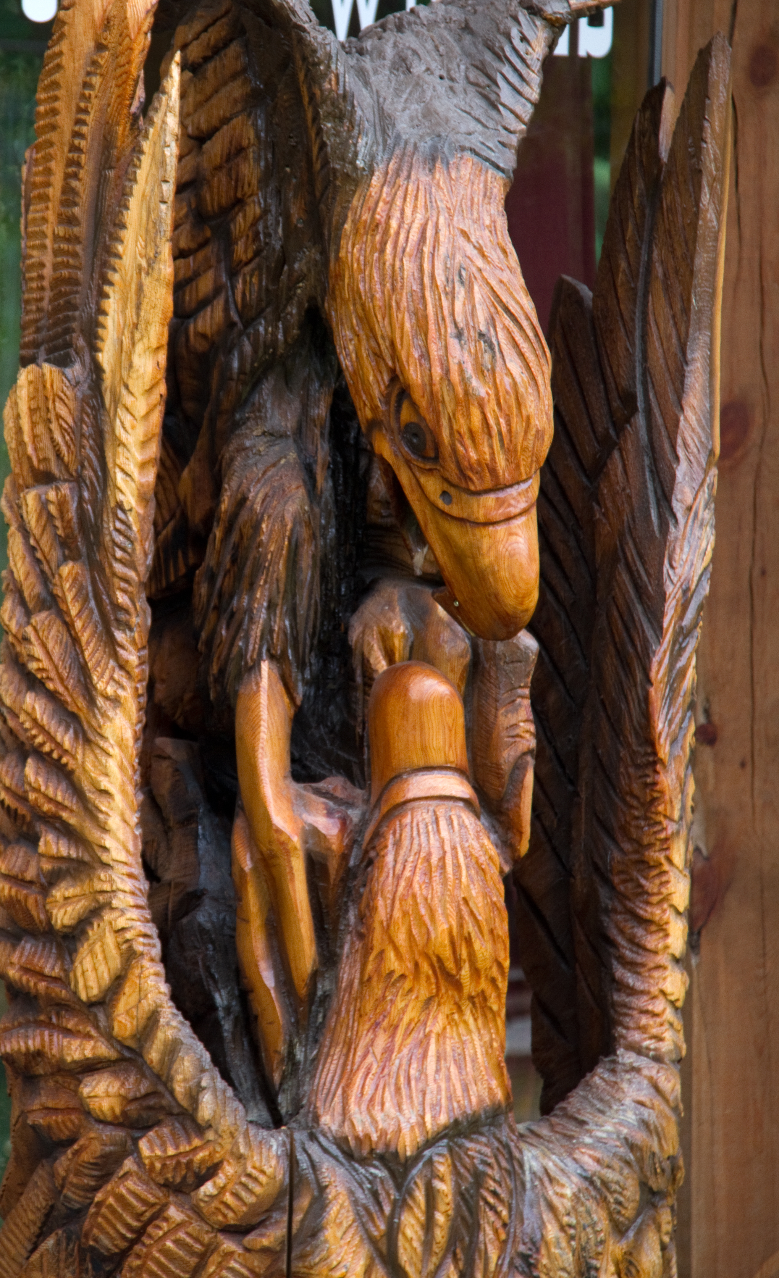 Eagle Sculpture 2